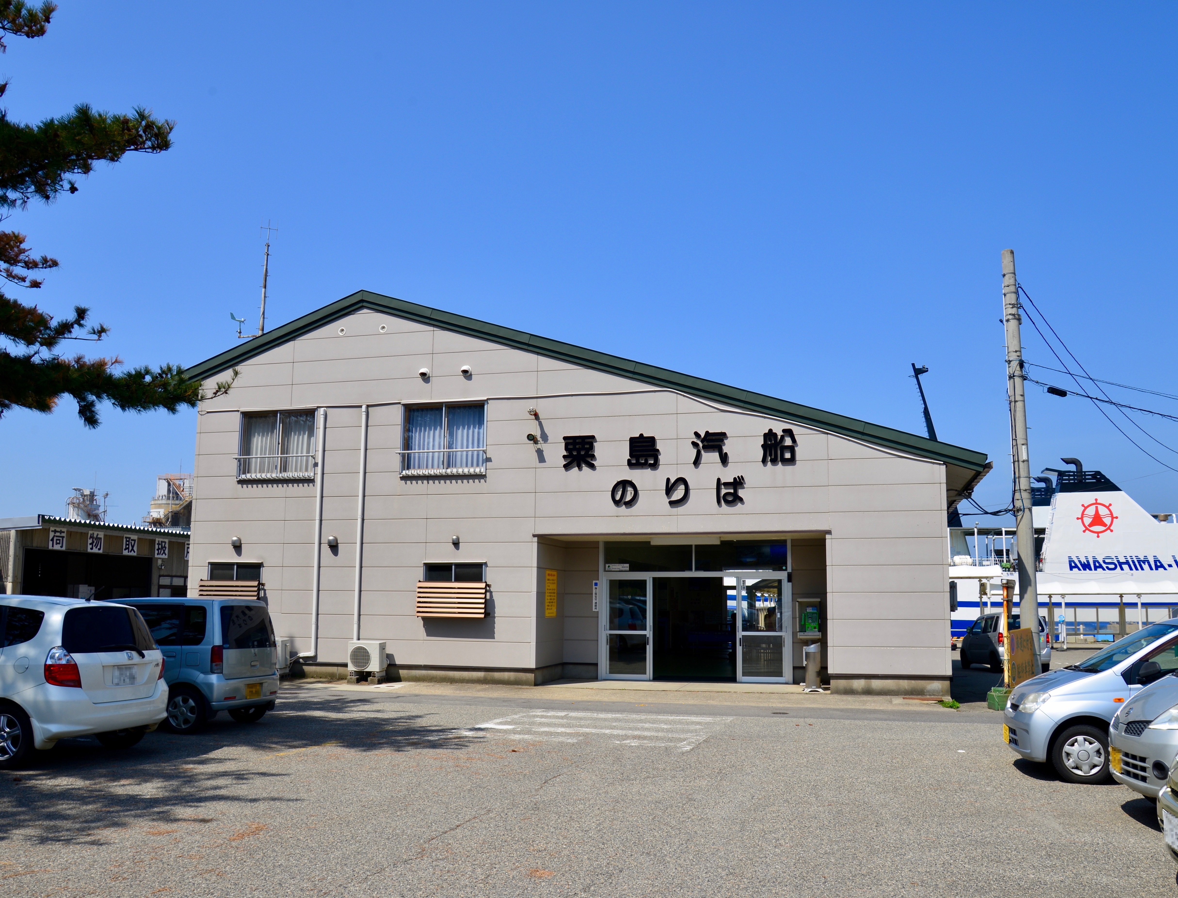 岩船港の粟島汽船のりば